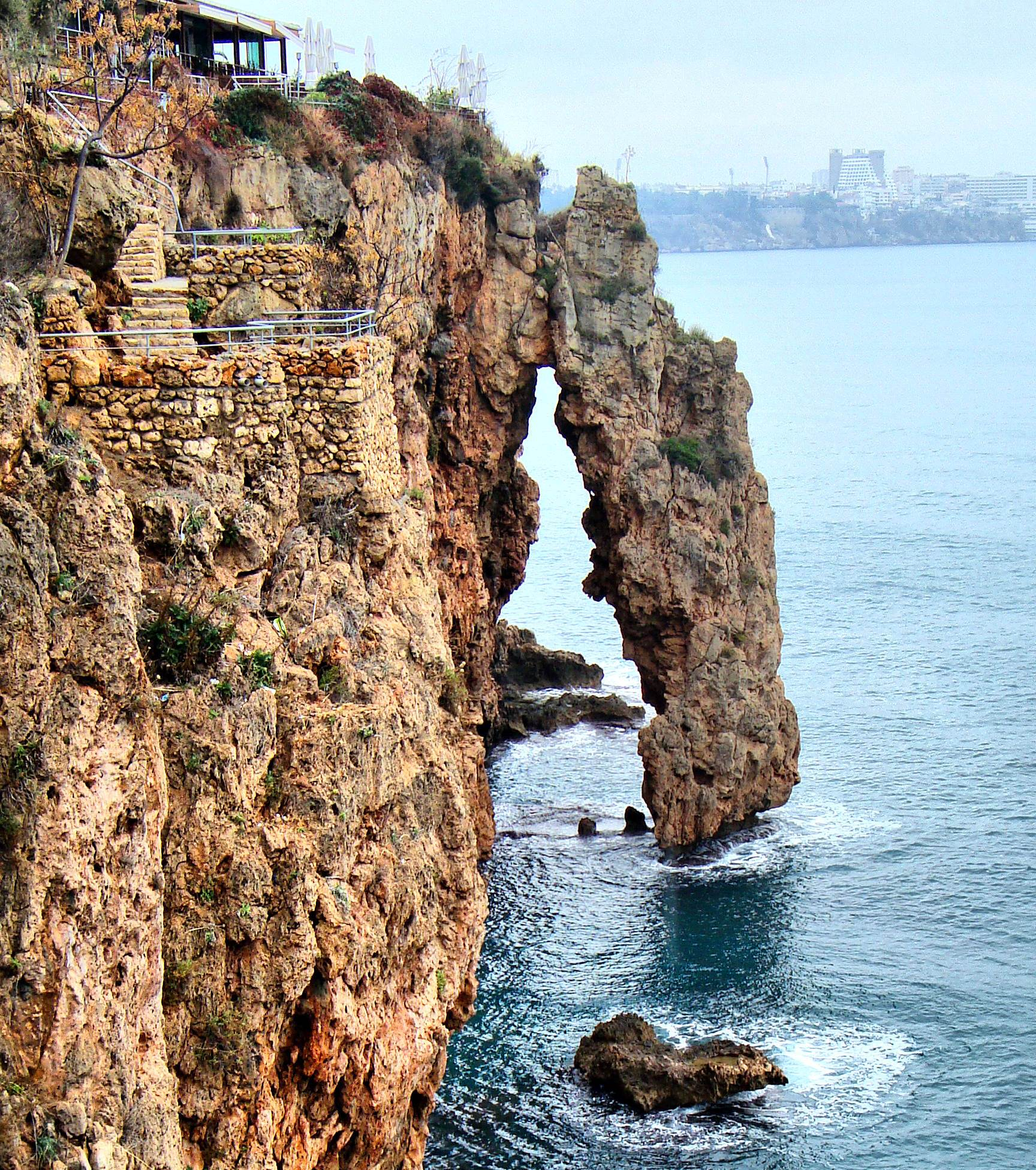 Atatürk park-Rocks-Antalya